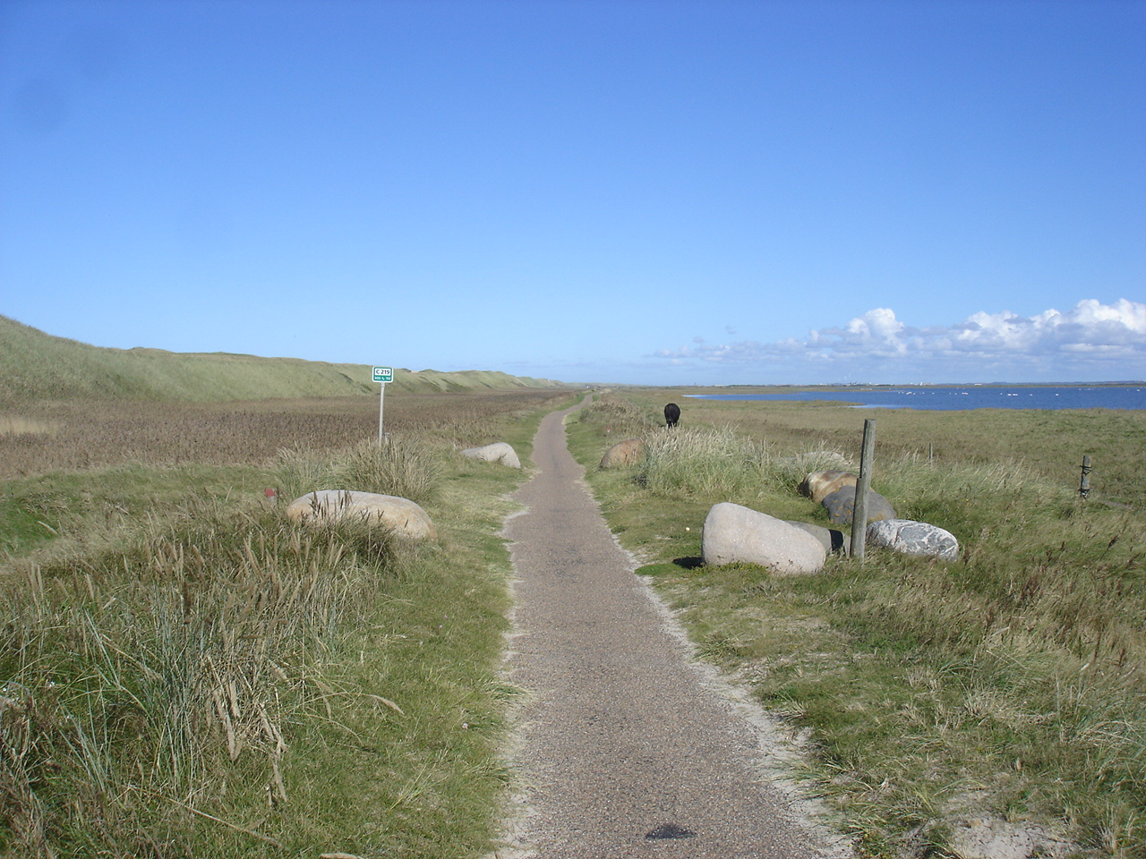 Lemvigbanens oprindelige tracé Ø for Flyvholmvej og klitrækken